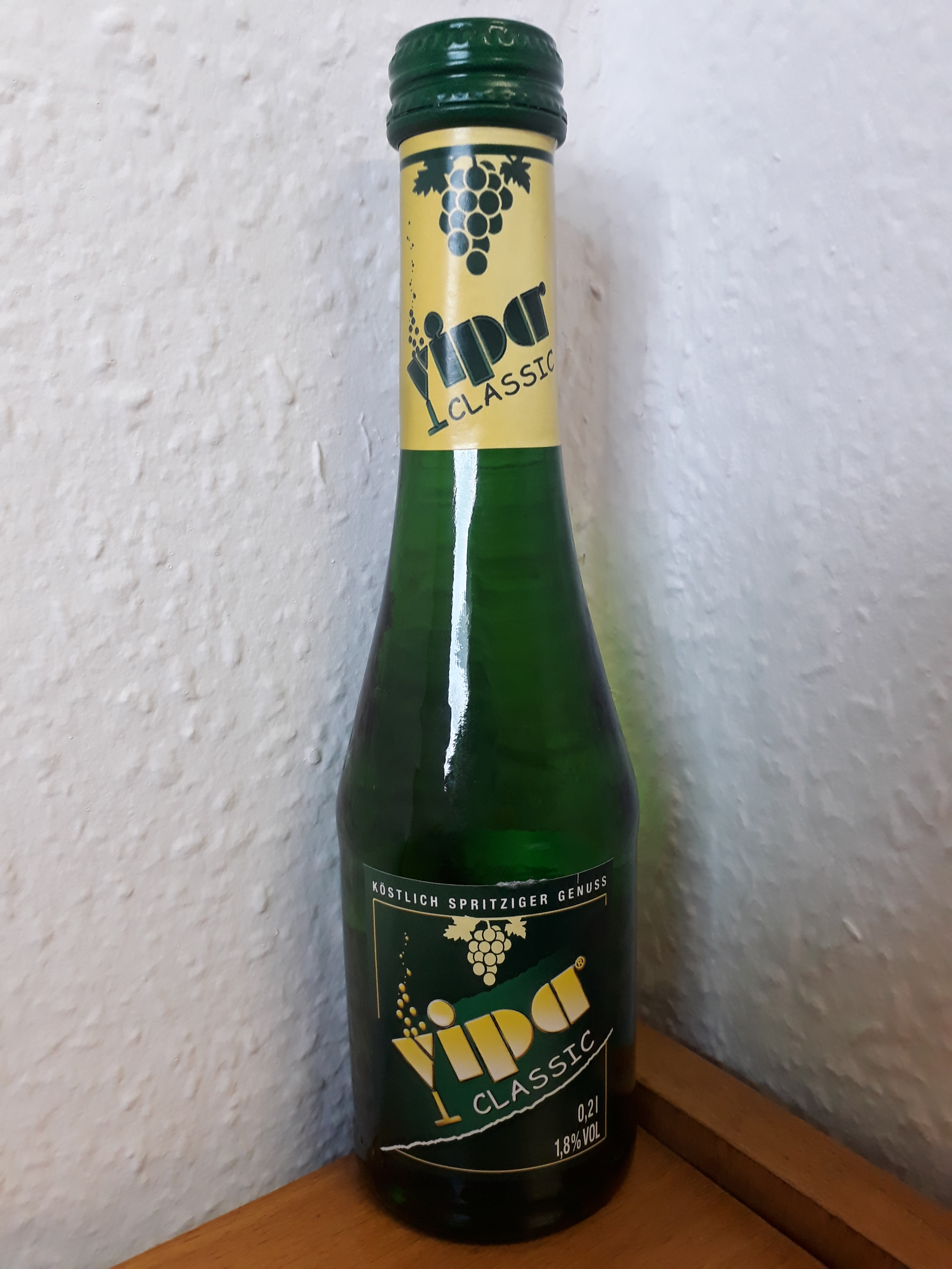 Flasche Vipa (Vorderseite)